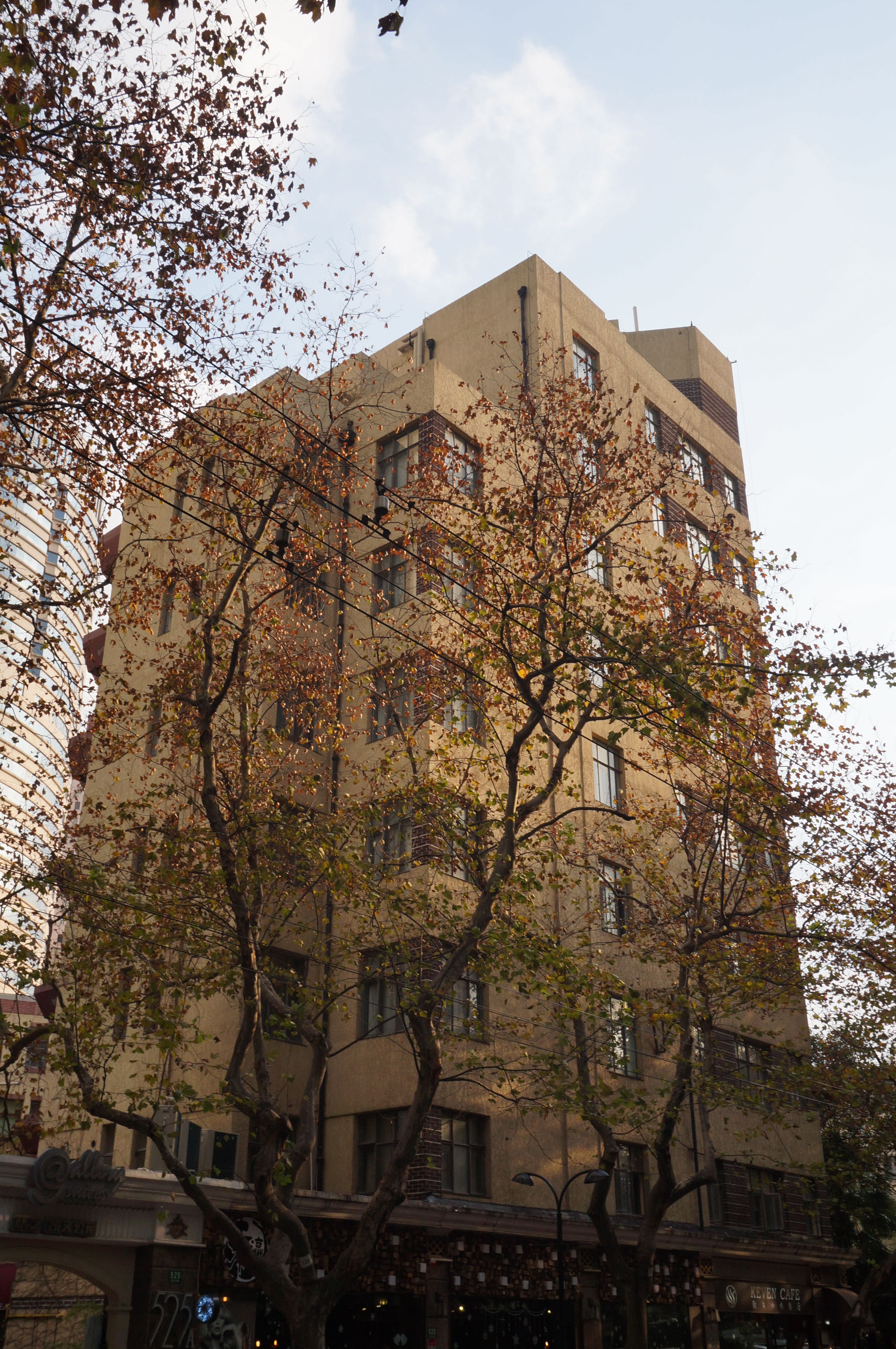 上海凯文公寓